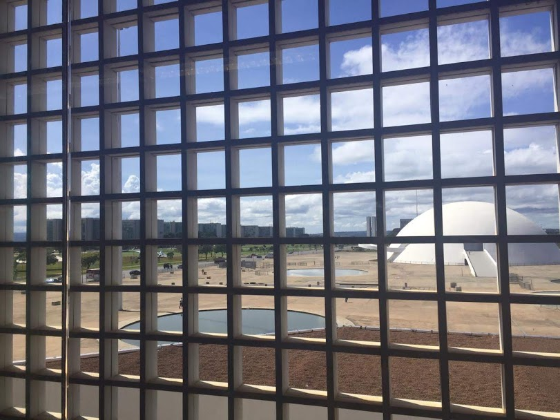 Cobogós